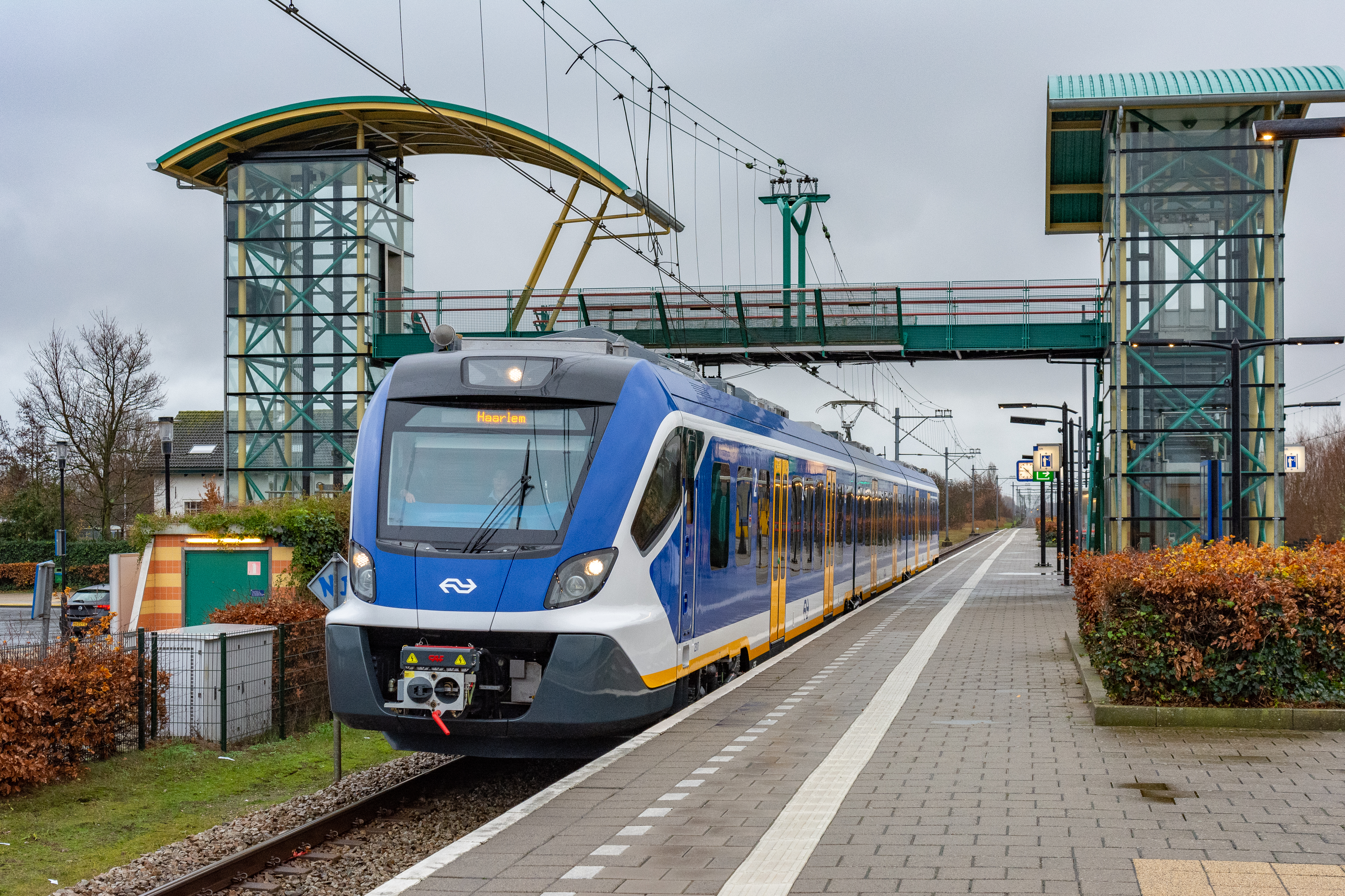 De eerste dag van de officiële inzet van de SNG. Zondag 9 december 2018. Hier vertrekt tijdens één van de talrijke regenbuien vanuit Hillegom SNG 2317, als Sprinter 6322 naar Haarlem